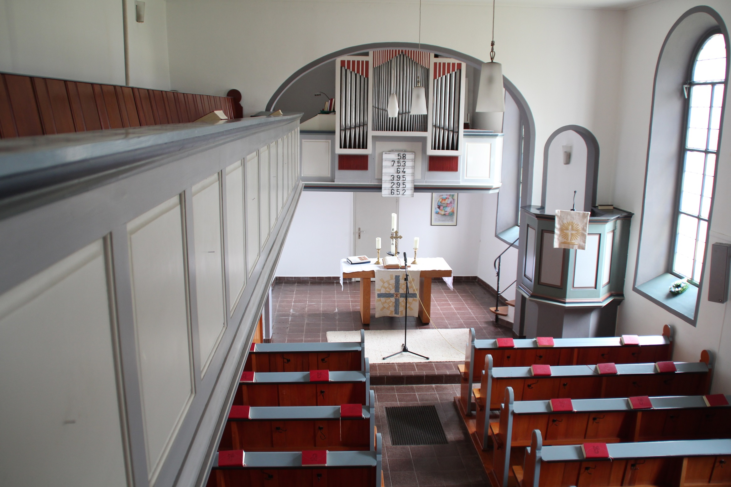 Prospekt der Hardt-Orgel der evangelischen Kirche Großrechtenbach zu Hüttenberg-Rechtenbach von der Kanzel aus gesehen